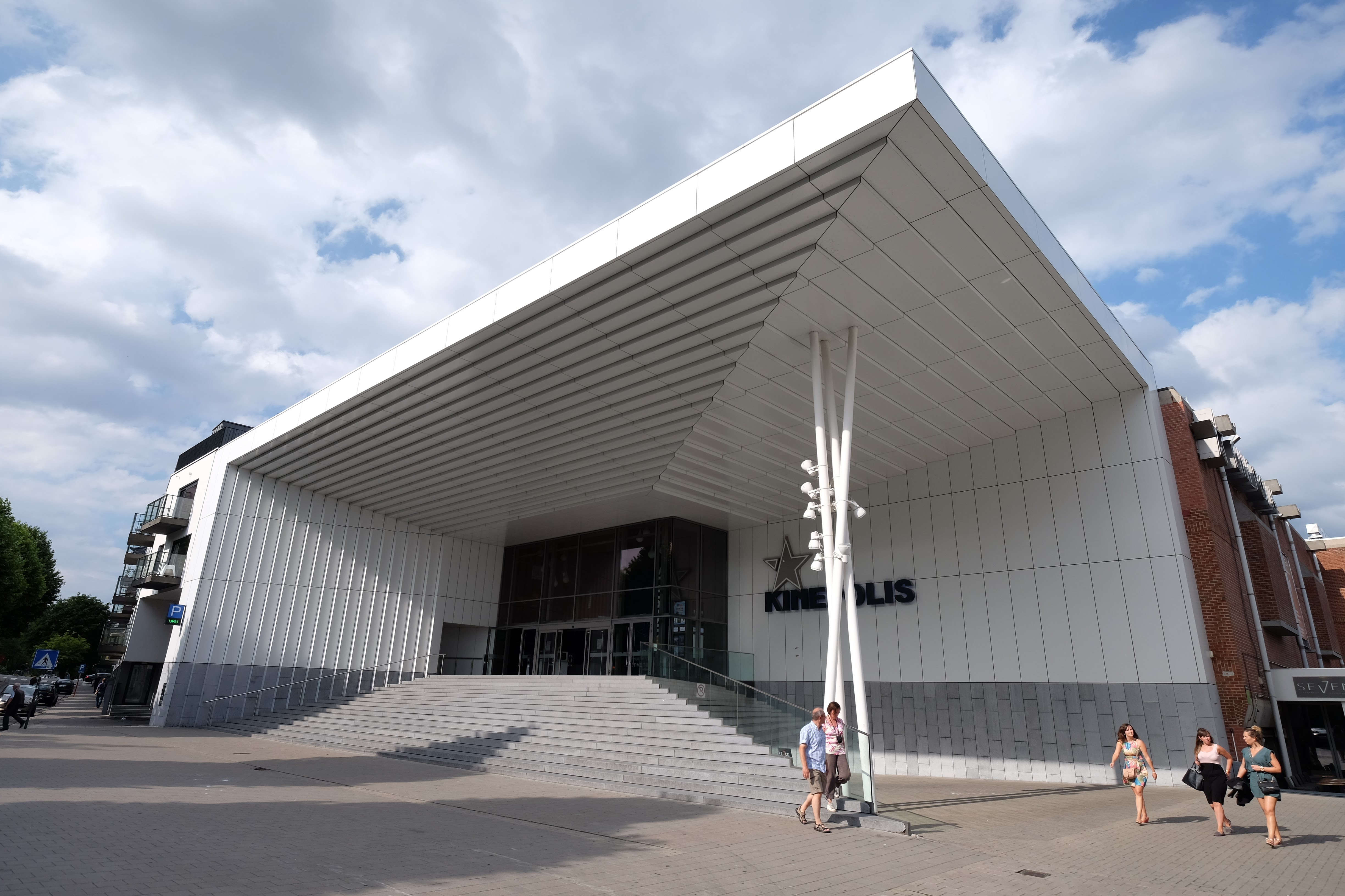 Ghent, Belgium